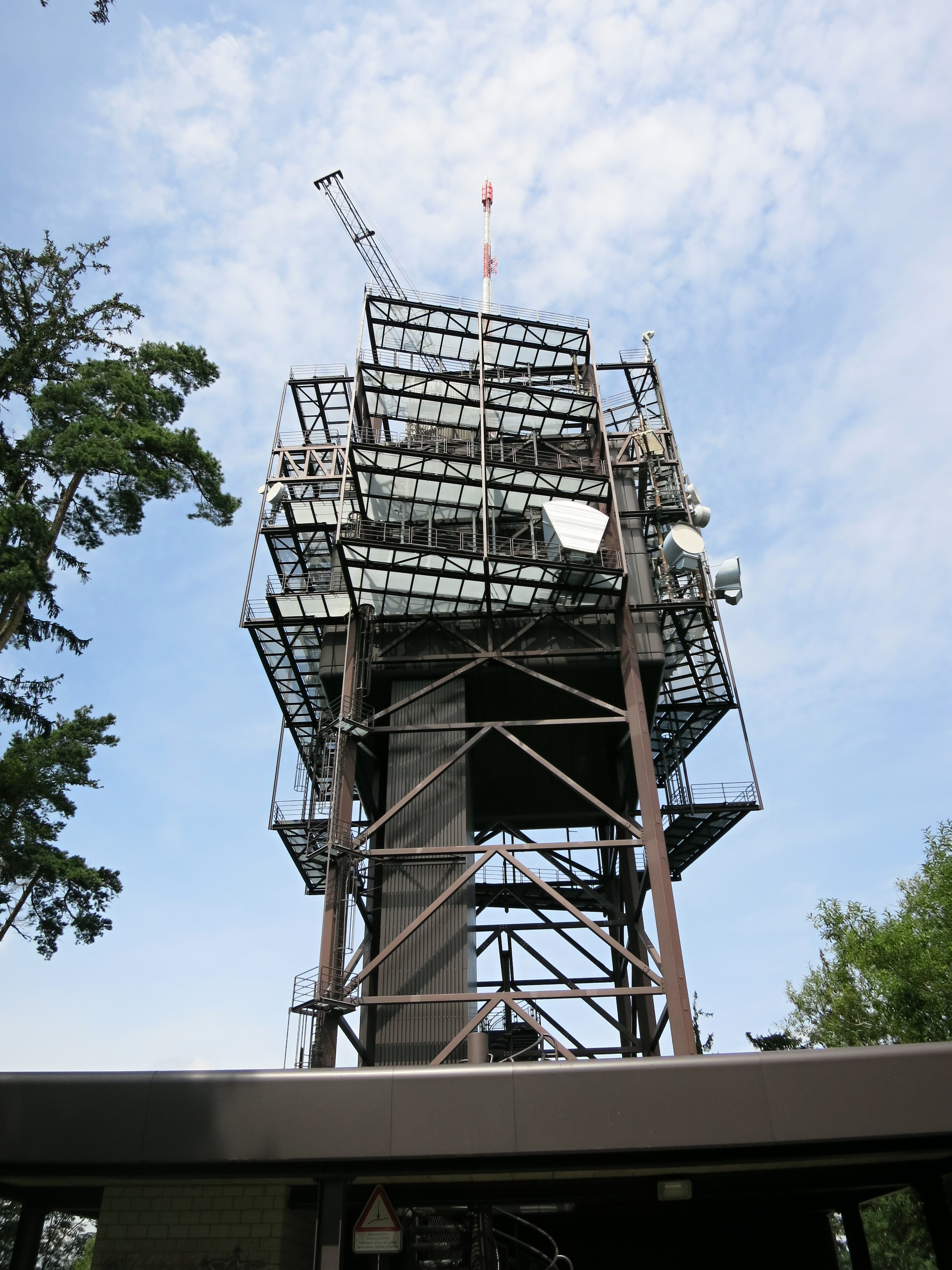 Ulmizbergturm